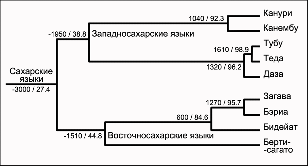 Схема сахарской языковой семьи по числу когнатов в процентном отношении и времени расхождения групп и идиомов. Источники: Václav Blažek. On application of glottochronology for saharan languages // Viva Africa. Proceedings of the IInd International Conference on African Studies (April 2007) / ed. by Tomáš Machalík & Jan Záhořík. — Plzeň: Dryáda, 2007. — S. 19—38.